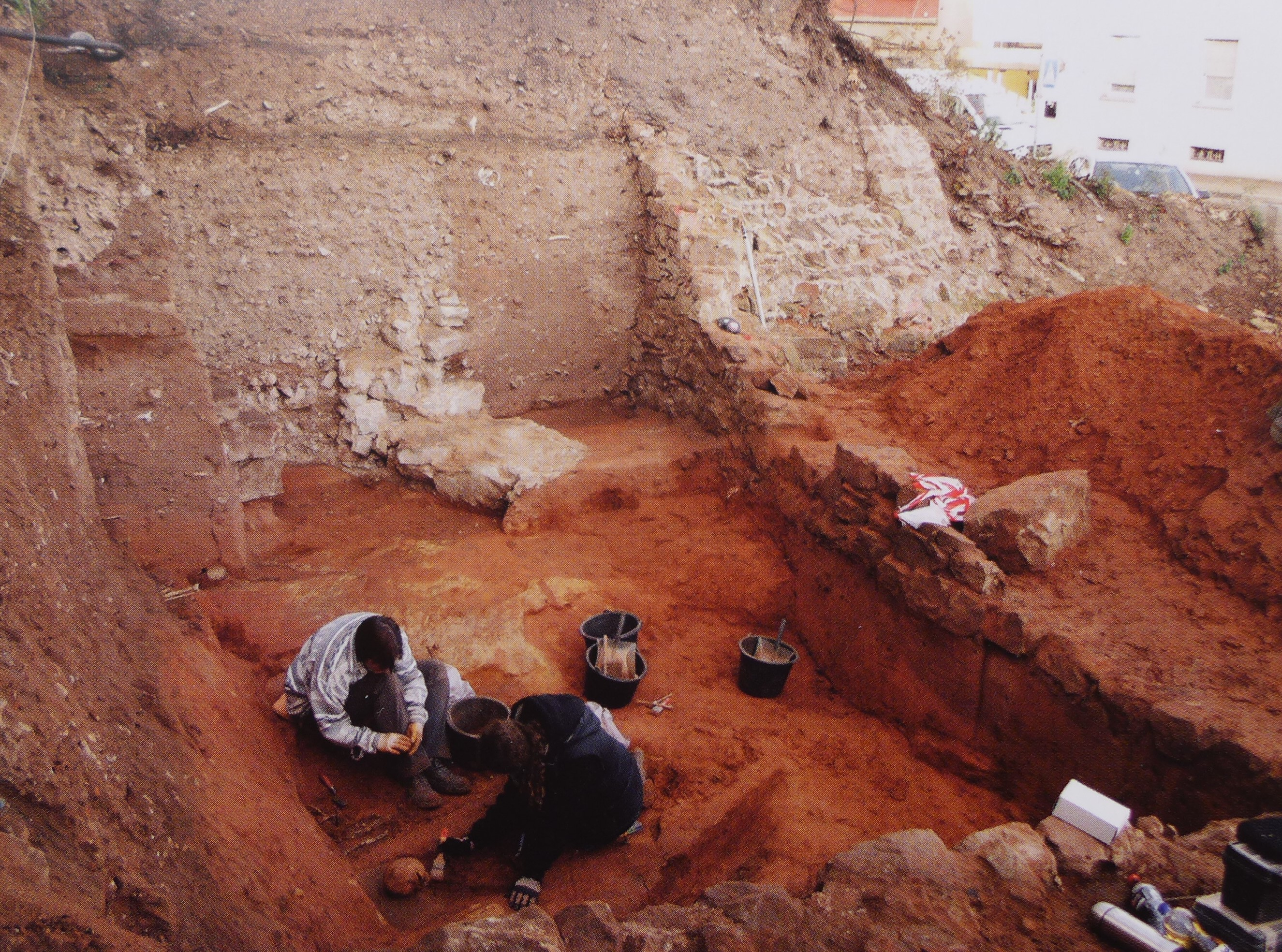 Wallerfangen, Archäologische Ausgrabungen am ehemaligen Friedhof der alten Wallerfanger Stadtpfarrkirche St. Peter und Paul im Jahr 2011